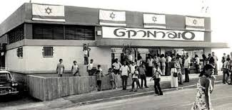 סניף קוא-אופ ירושלים הראשון